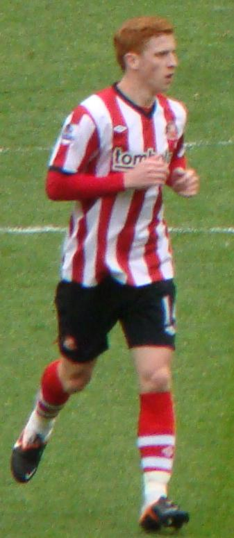 SAFC vs MUFC